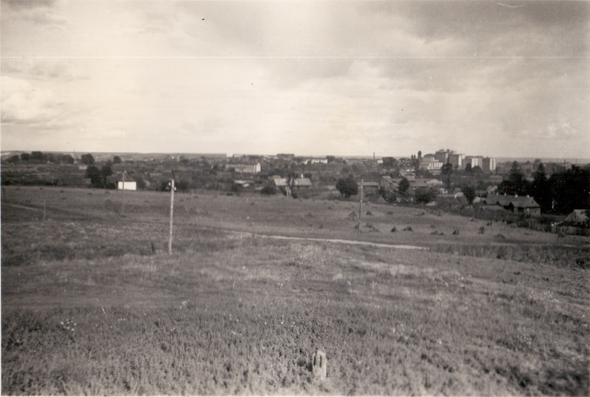 Беларуская (тарашкевіца): Менск (Miensk), Мядзьведжына (Miadźviedžyna)